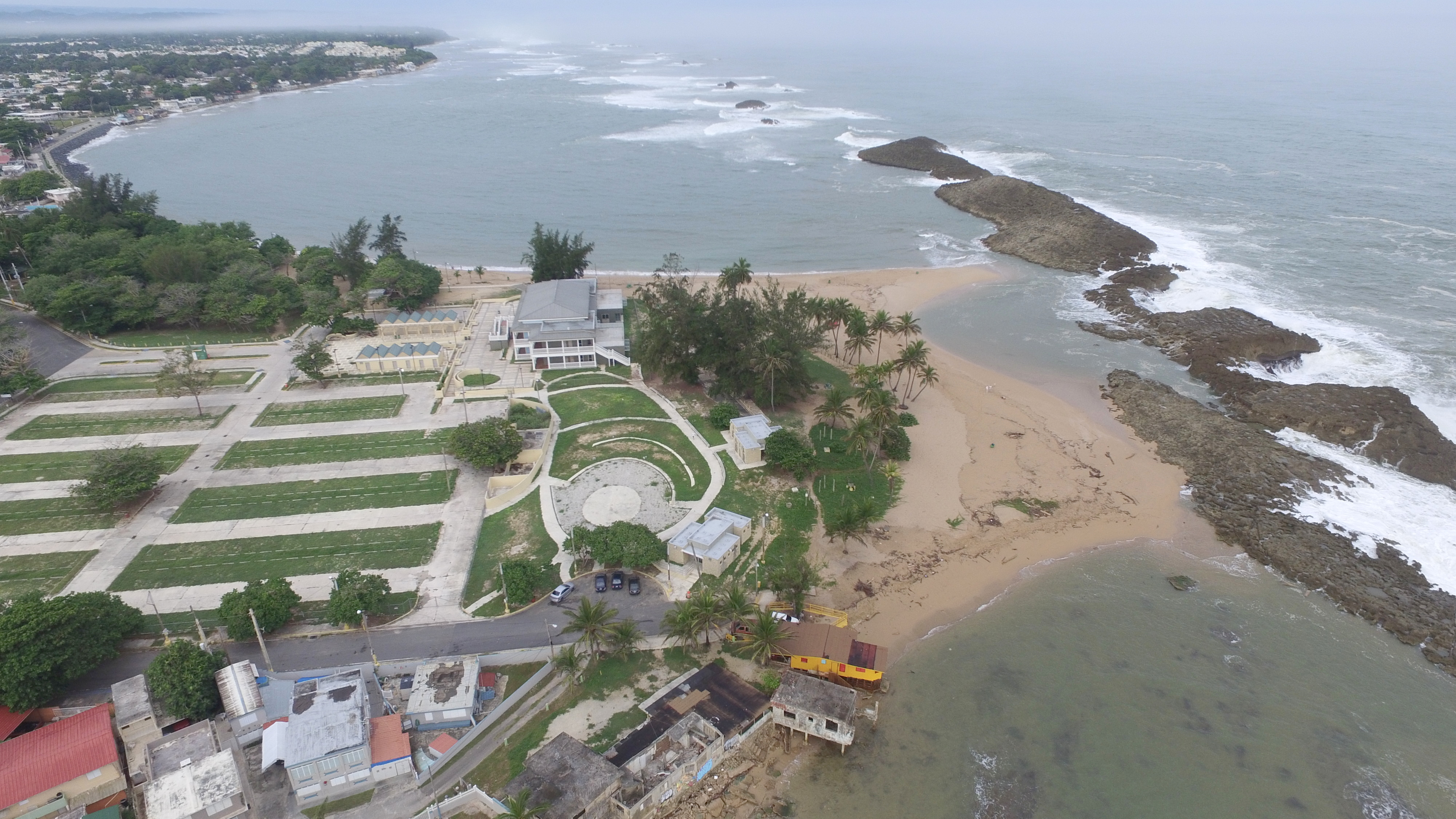 PR-692, Vega Baja, 00693, Puerto Rico